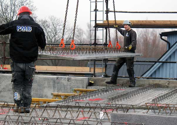 Montage av plattbärlagThe photo was taken in Malmö, Sweden.